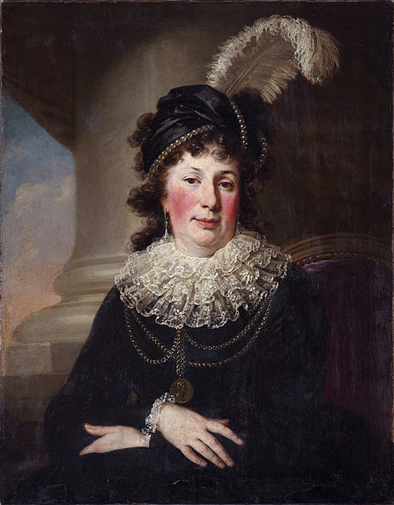 Беларуская (тарашкевіца): Партрэт Караліны Патоцкай (Karalina Patockaja) з роду Сапегаў (Sapieha)